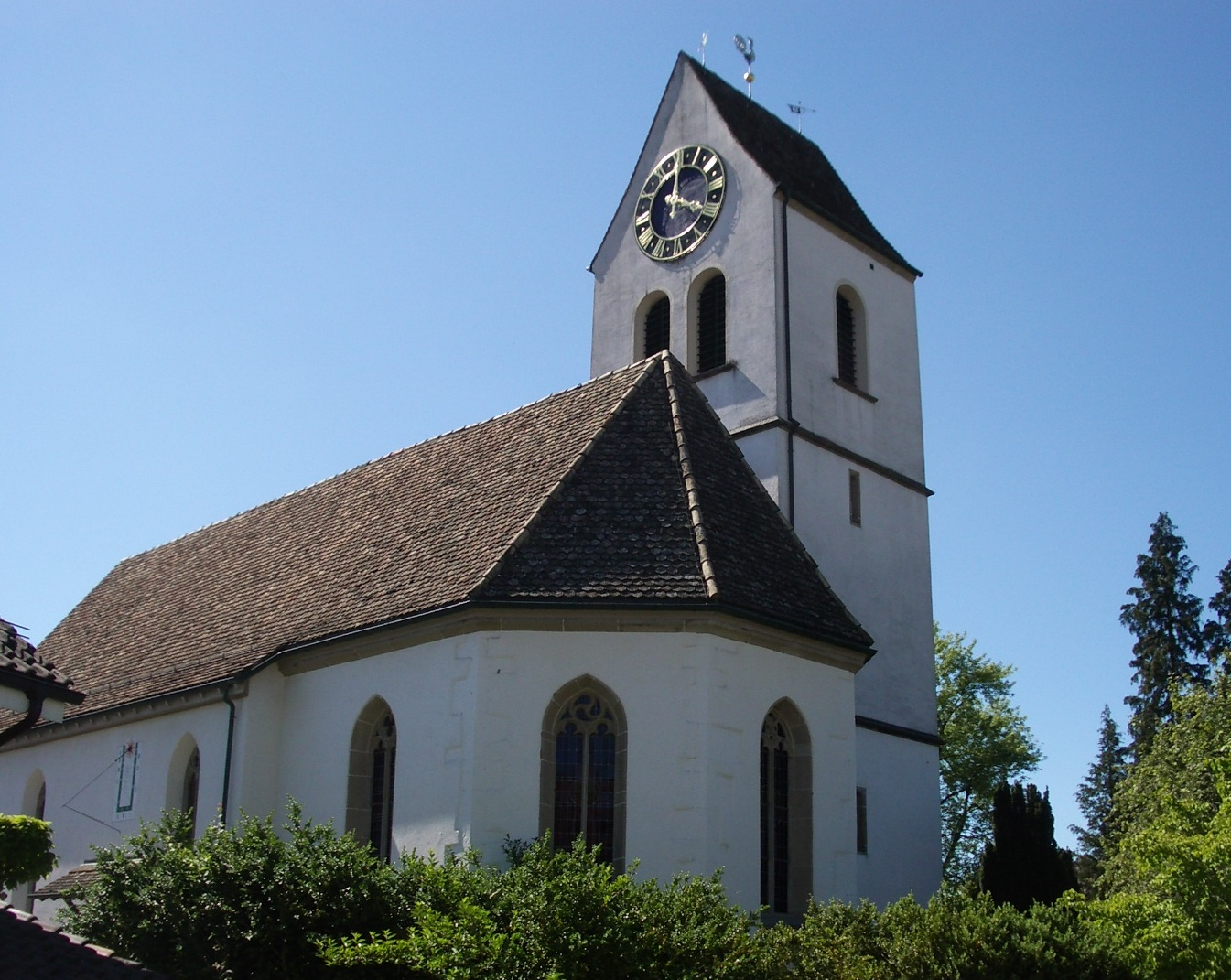 Bonstetten ZH, Switzerland